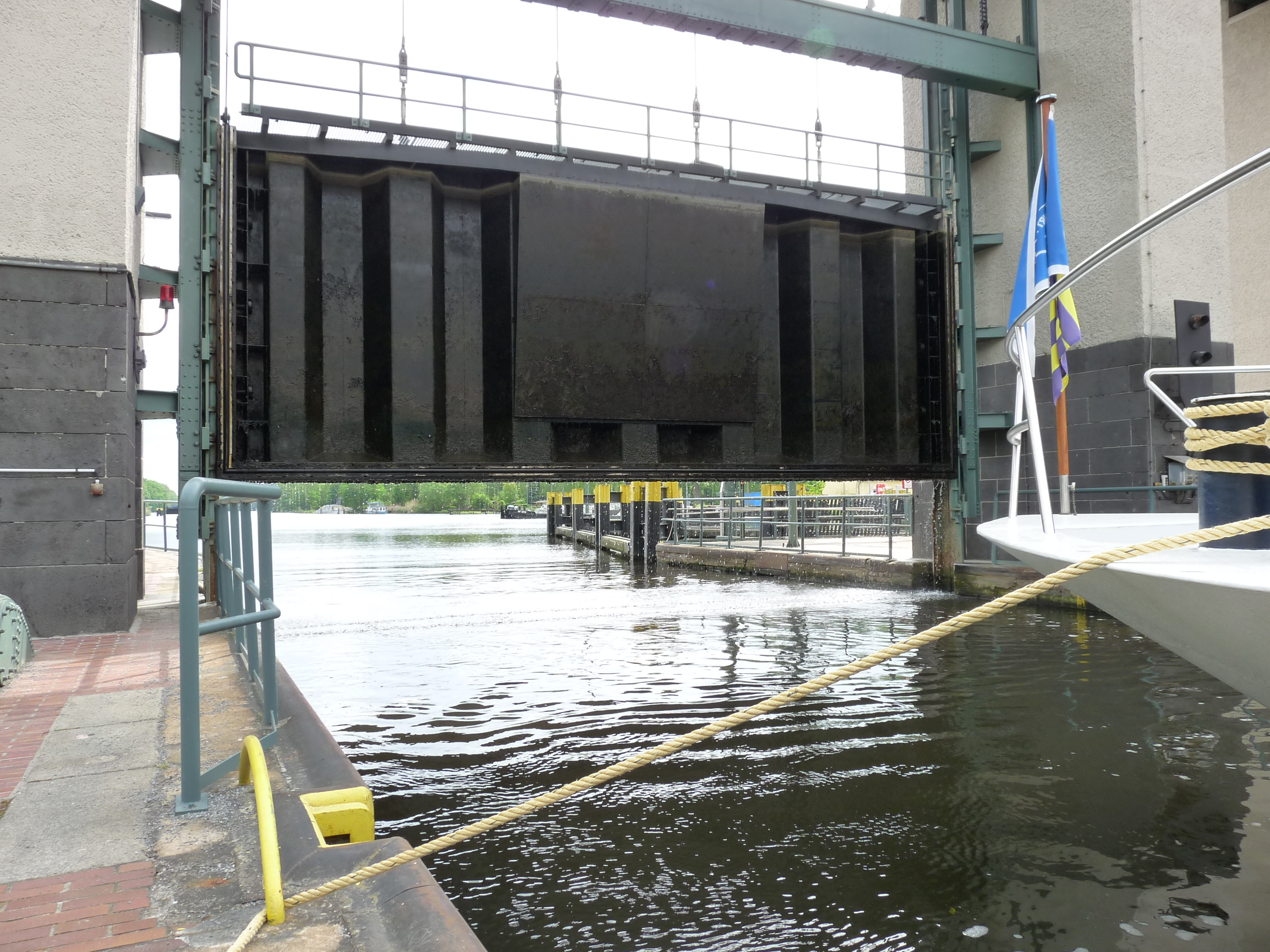 Hubtor Mittelkammer Oberhaupt